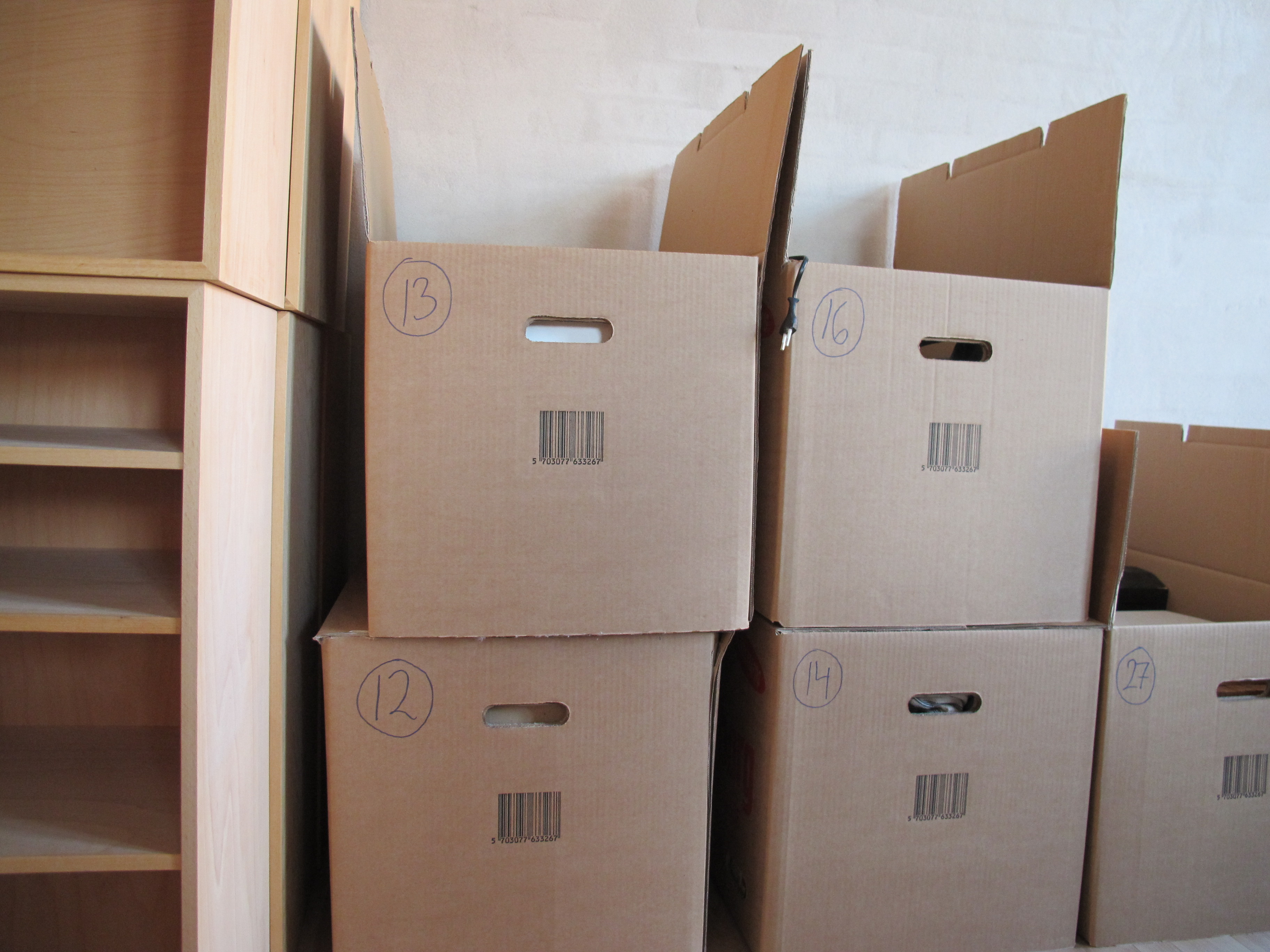 Almost done